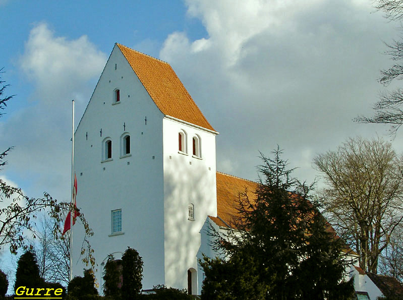 fra sydvest